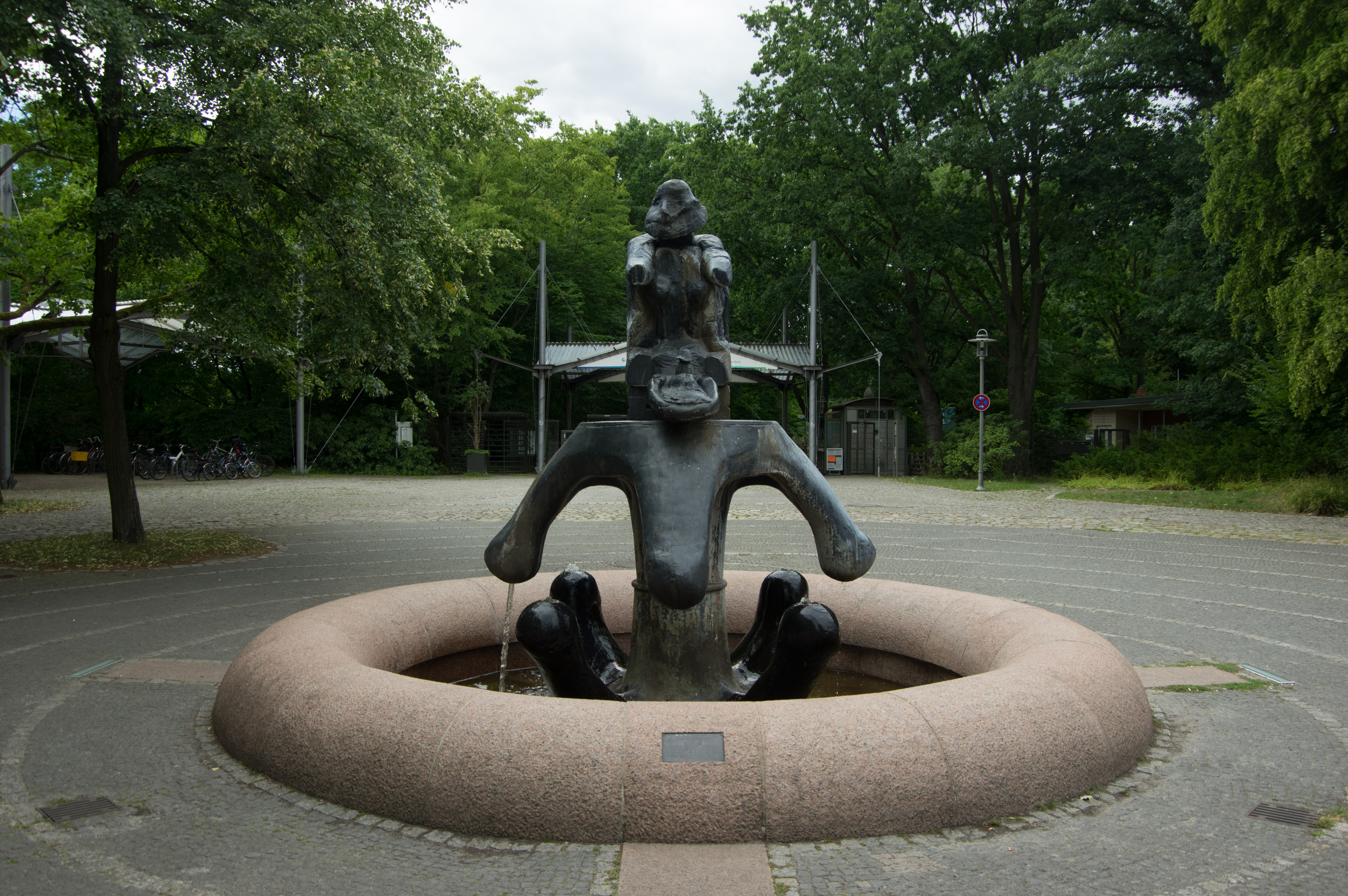 Berlin, Ortsteil Britz. Der Brunnen Fette Henne steht vor dem Eingang zjm Britzer Garten an der Buckower Allee. Erstelle wurde der Brunnen von Rolf Szymanski.